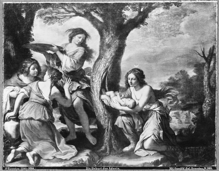 Die Geburt des Adonis aus dem Myrrhenbaum. Leinwand, 2,10 x 2,70 m. Gemäldegalerie Alte Meister 365, Kriegsverlust